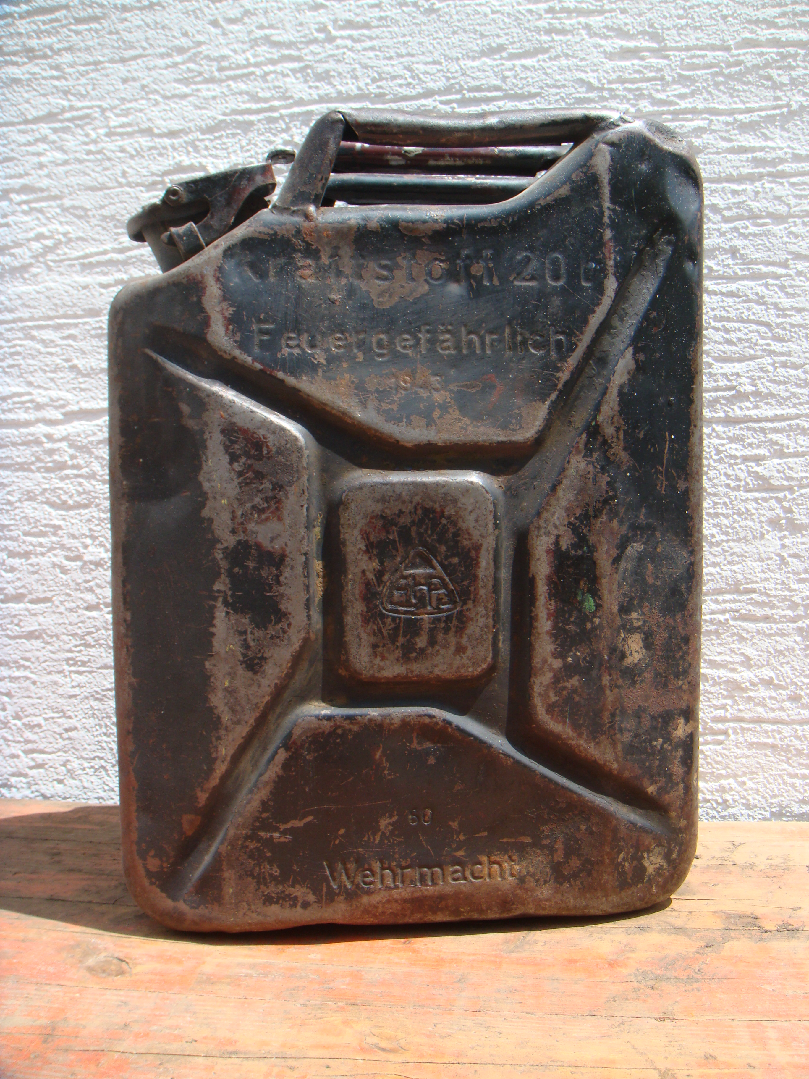 Wehrmachts Jerrycan